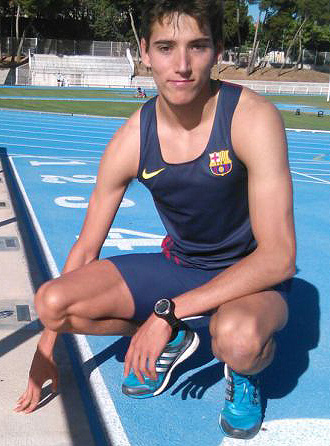 Lucas Búa, en Toledo.